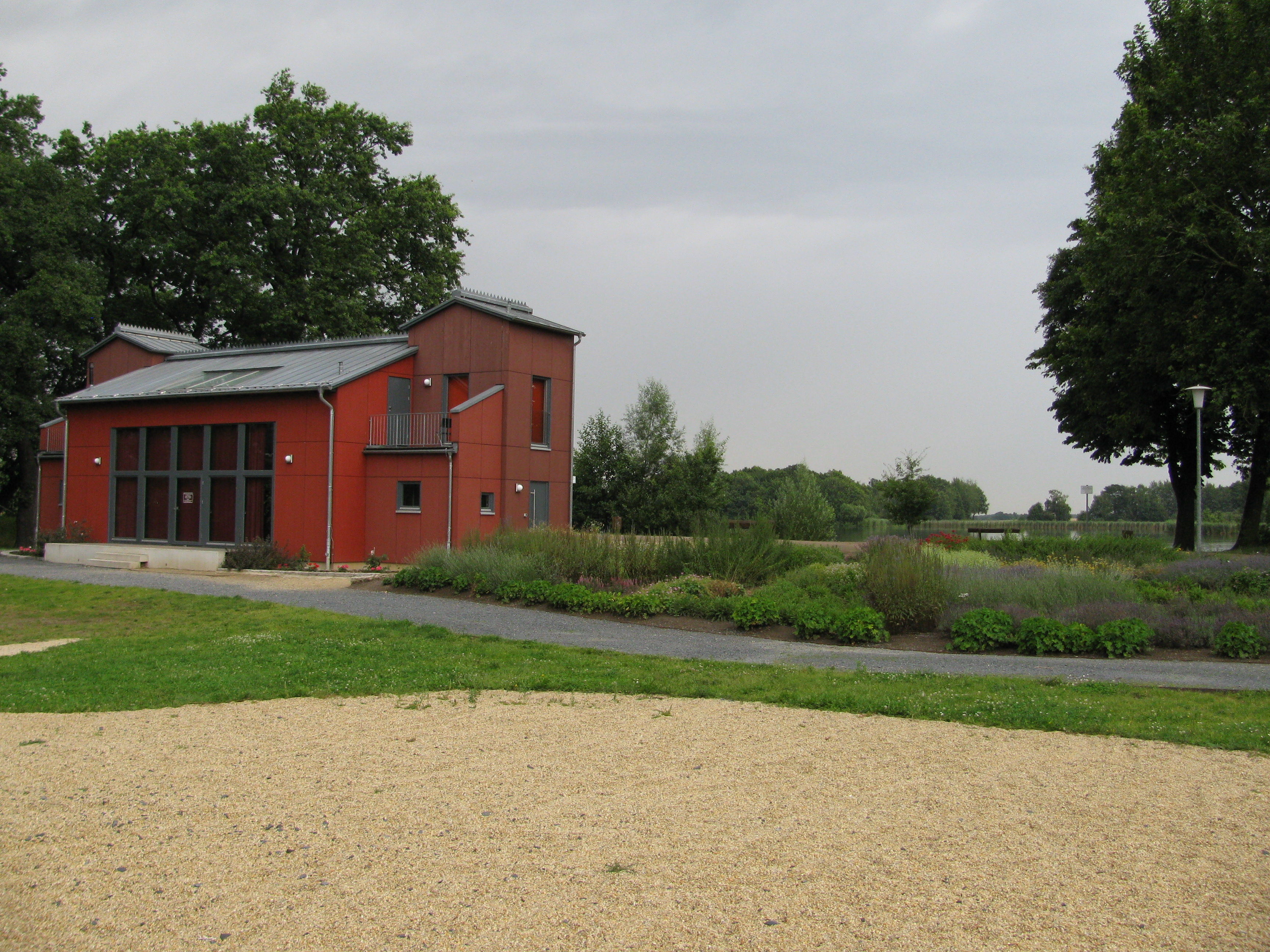 Rotes Haus am Ufer des Dippelsdorfer Teichs in Dippelsdorf im Ortsteil Friedewald, Gemeinde Moritzburg, Sachsen. Ähnlicher Vorläufer des Gebäudes (Badehaus am Strandbad Friedewald) erlangte Bekanntheit durch verschiedene Werke von Mitgliedern der expressionistischen Künstlergruppe "Brücke".